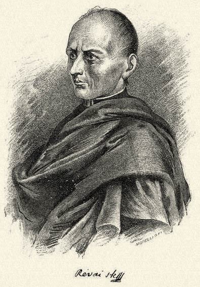 Révai Miklós (1750–1807) nyelvész, író, költő, egyetemi tanár. Morelli Gusztáv fametszete. Megjelent Az Osztrák-Magyar Monarchia írásban és képben (1887–1901) kiadványban